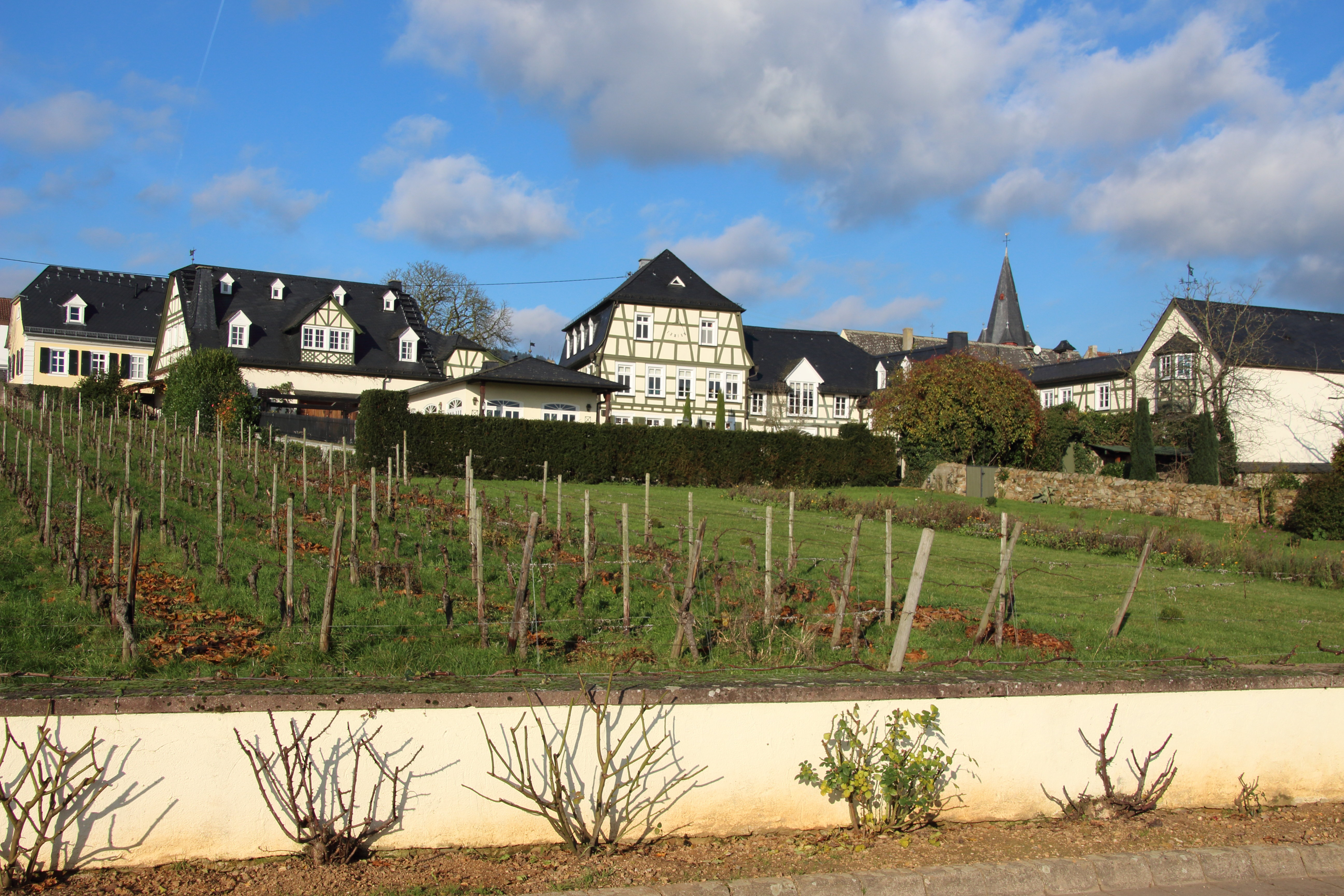 Ehemaliges Adam von Itzstein'sches Hofgut, Niederwaldstr. 7a, Hallgarten im Rheingau